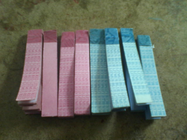 நீல மற்றும் சிவப்பு லிட்மசுத் தாள்